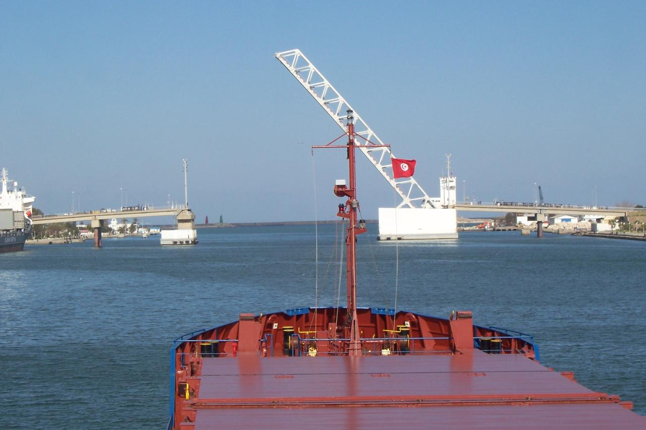 Pilsum leaving Bizerte